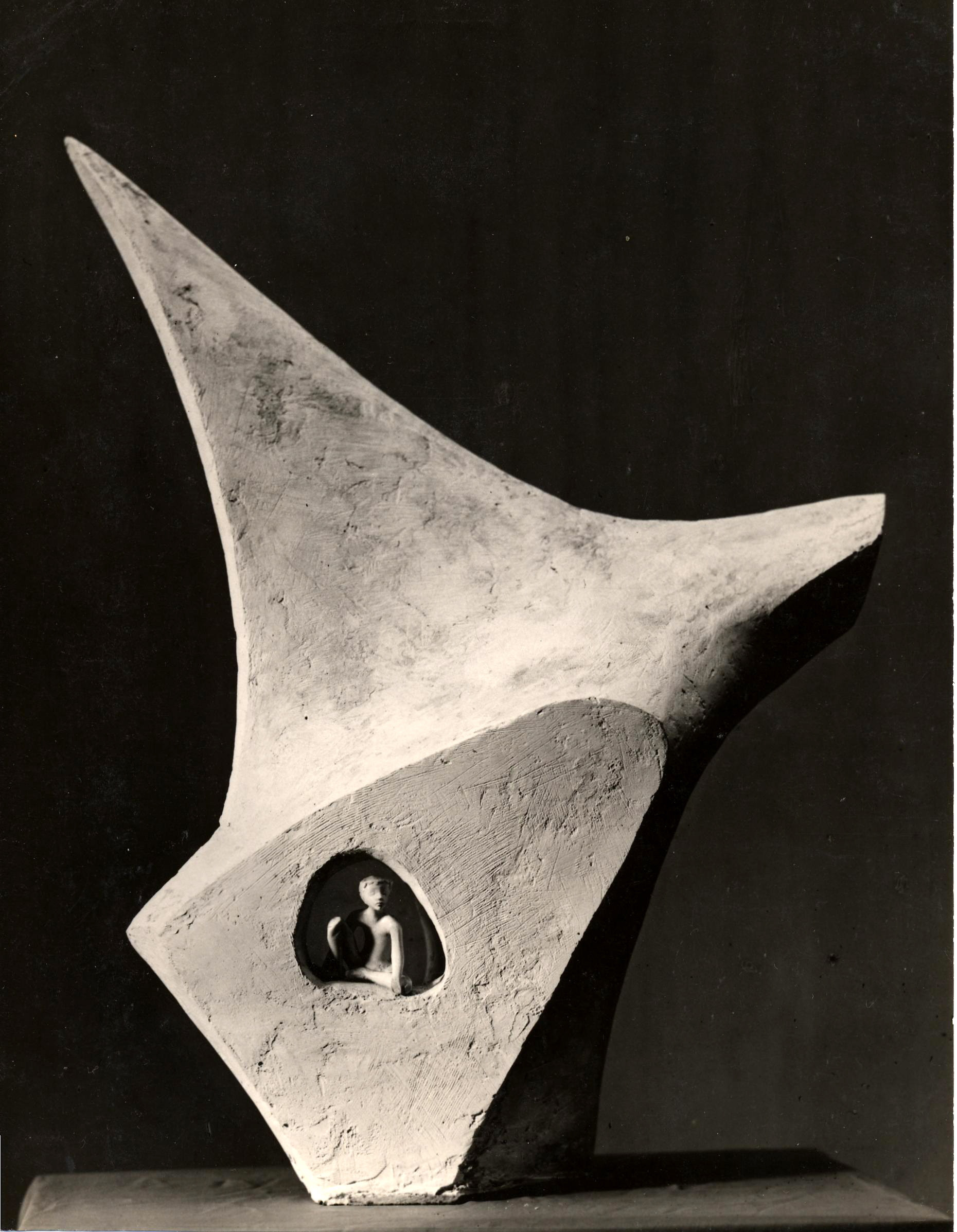 Maquette du monument à Antoine de Saint-Exupéry du sculpteur Marcel Mayer